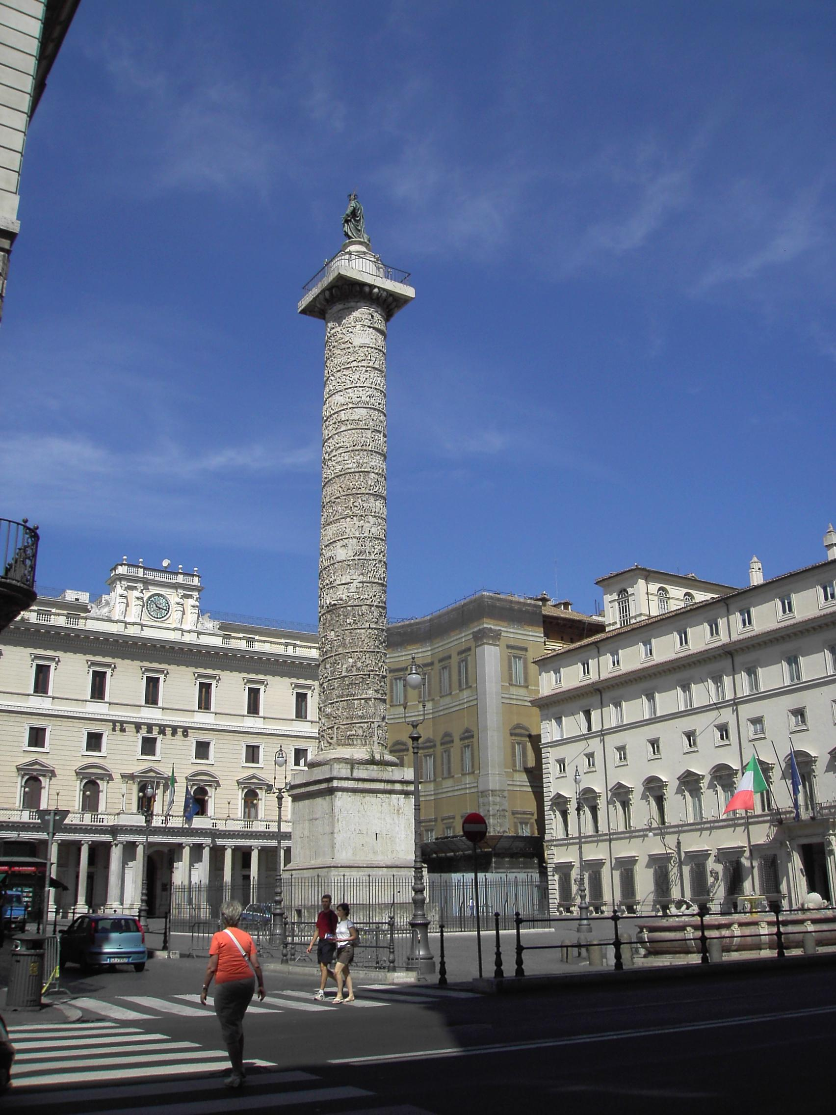 Roma, piazza Colonna